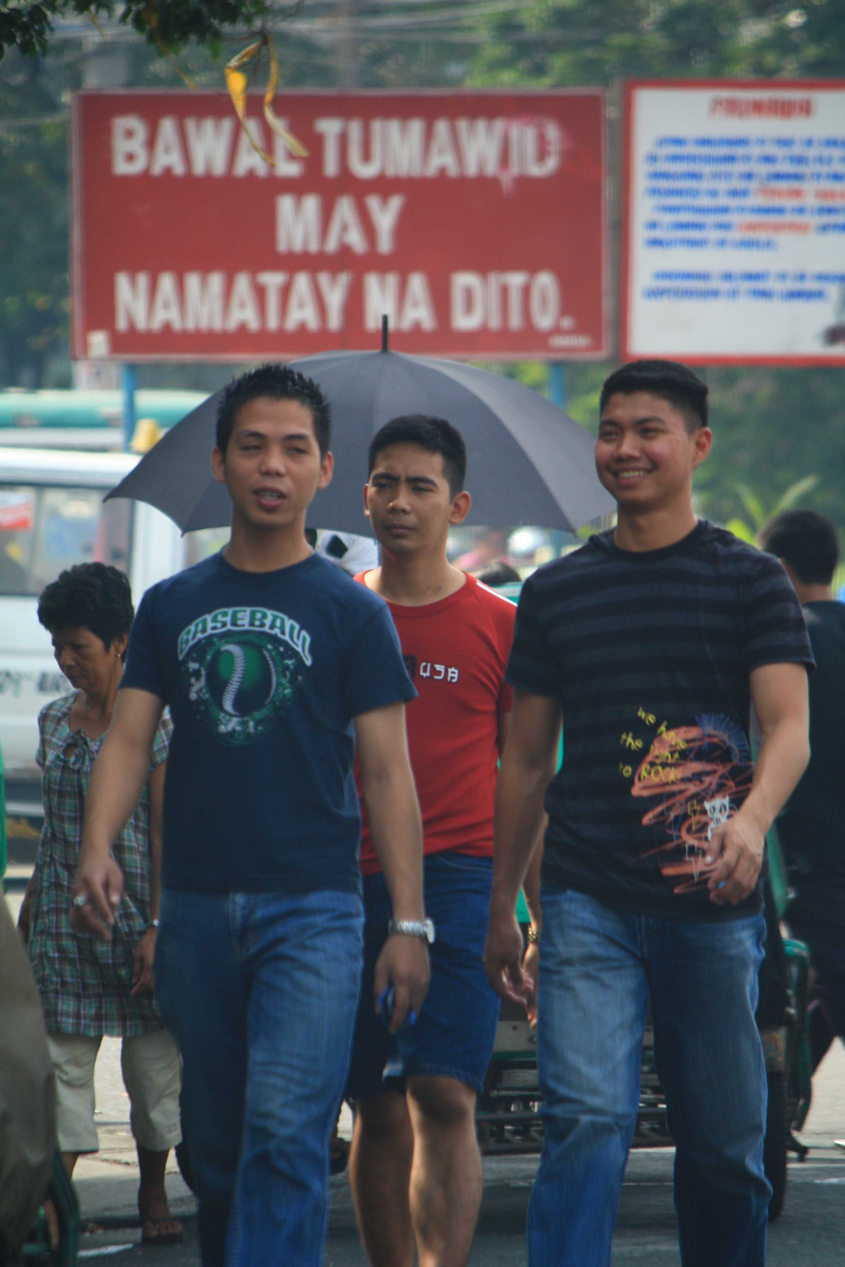 Jaywalking in Manila, Philippines